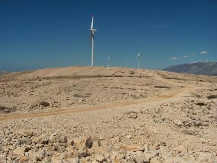 VE Ravna na Pagu